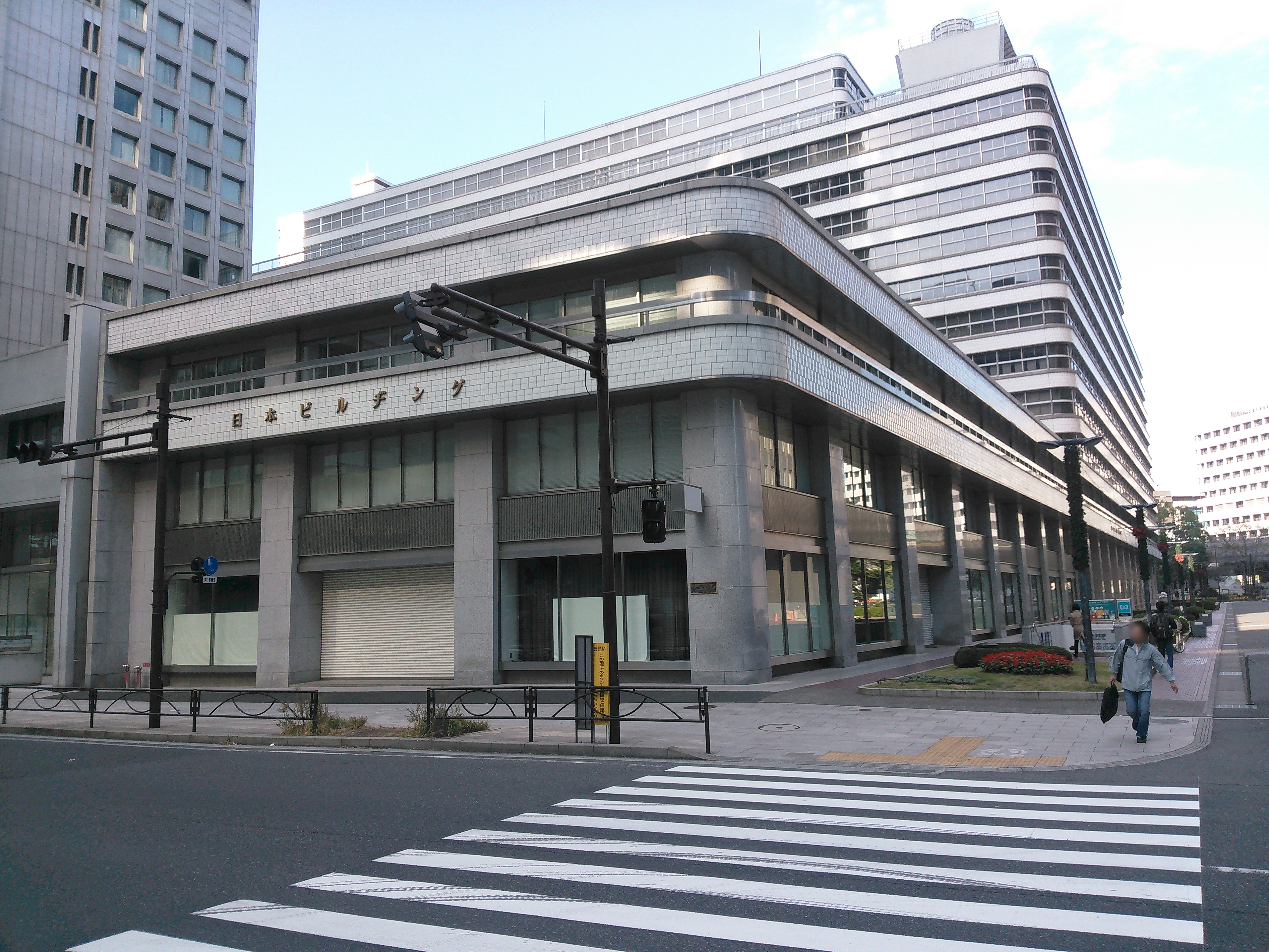 東京都千代田区大手町、日本ビルヂング